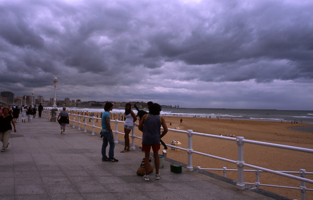 Vista de El Muro; Playa de San Lorenzo, Gijón (Asturias)